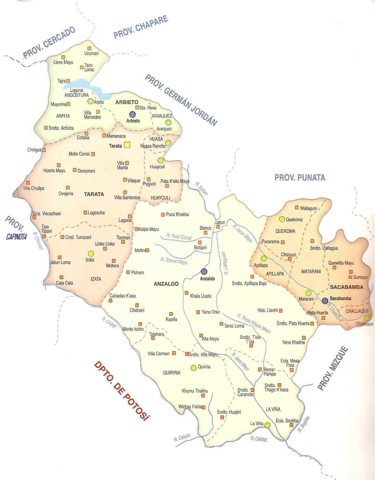 Mapa Político de la Provincia Esteban Arce